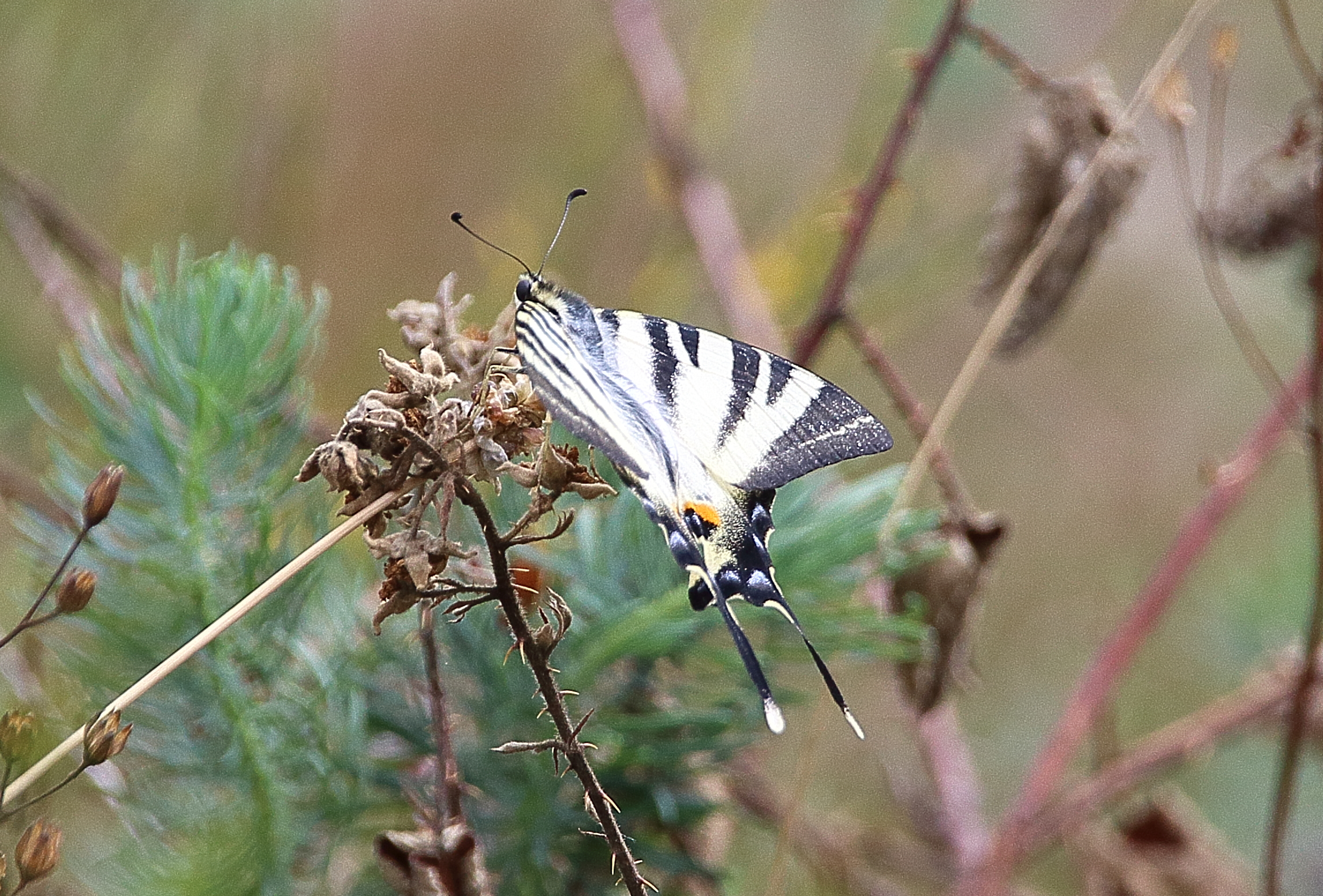 Segelfalter (Iphiclides podalirius) im Naturschutzgebiet Engweger Kopf und Scheibigkopf bei Lorch im Rheingau.